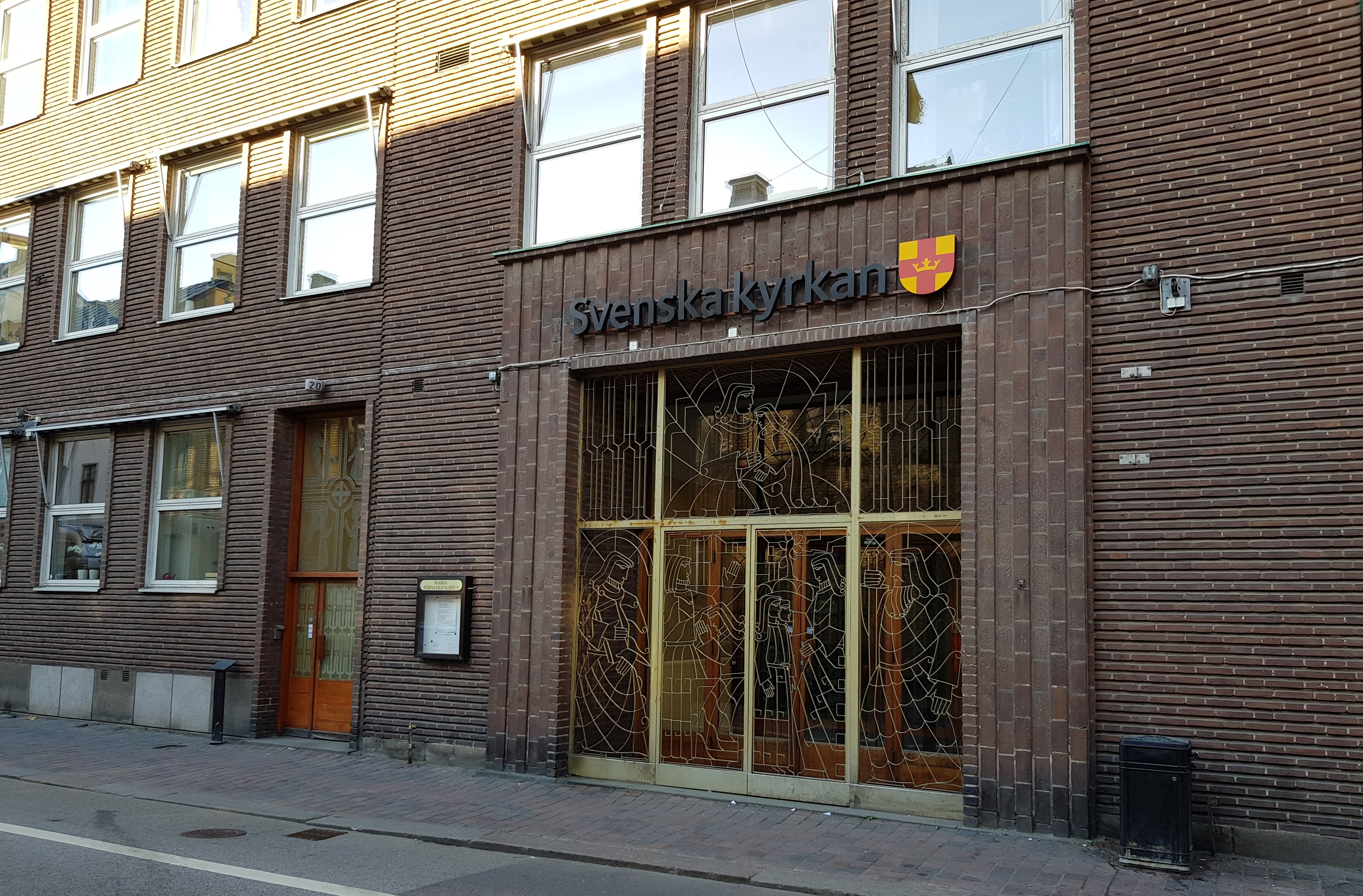 Maria församlingshus (eller Maria församlingshem) i Helsingborg.